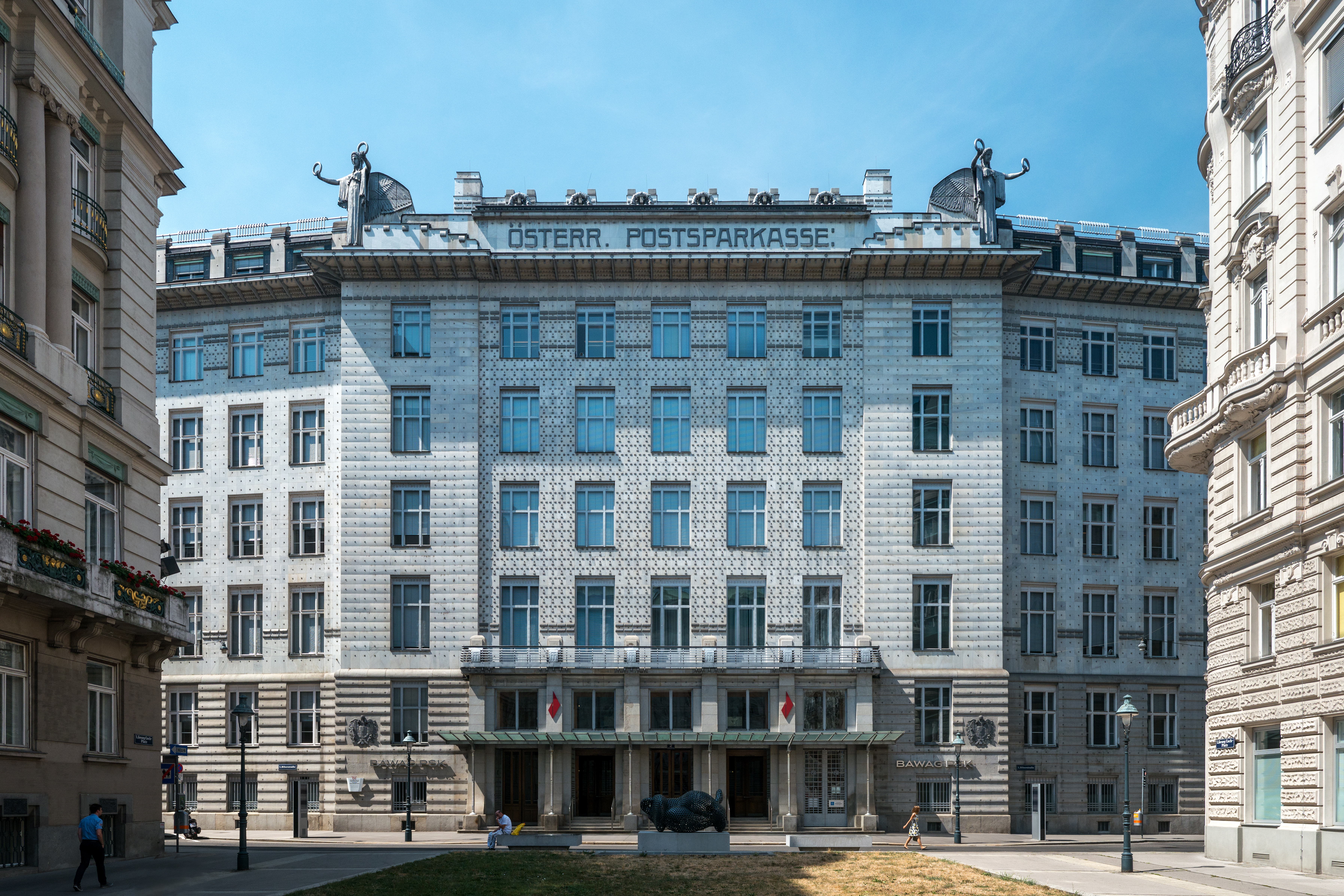 Postsparkasse